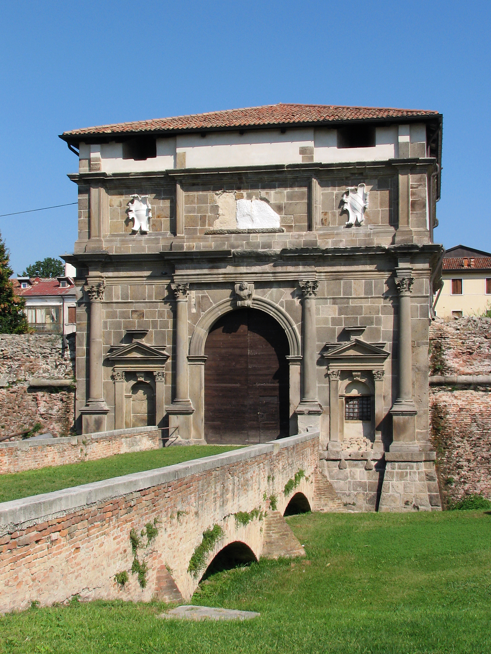 Padova: Porta San Giovanni.